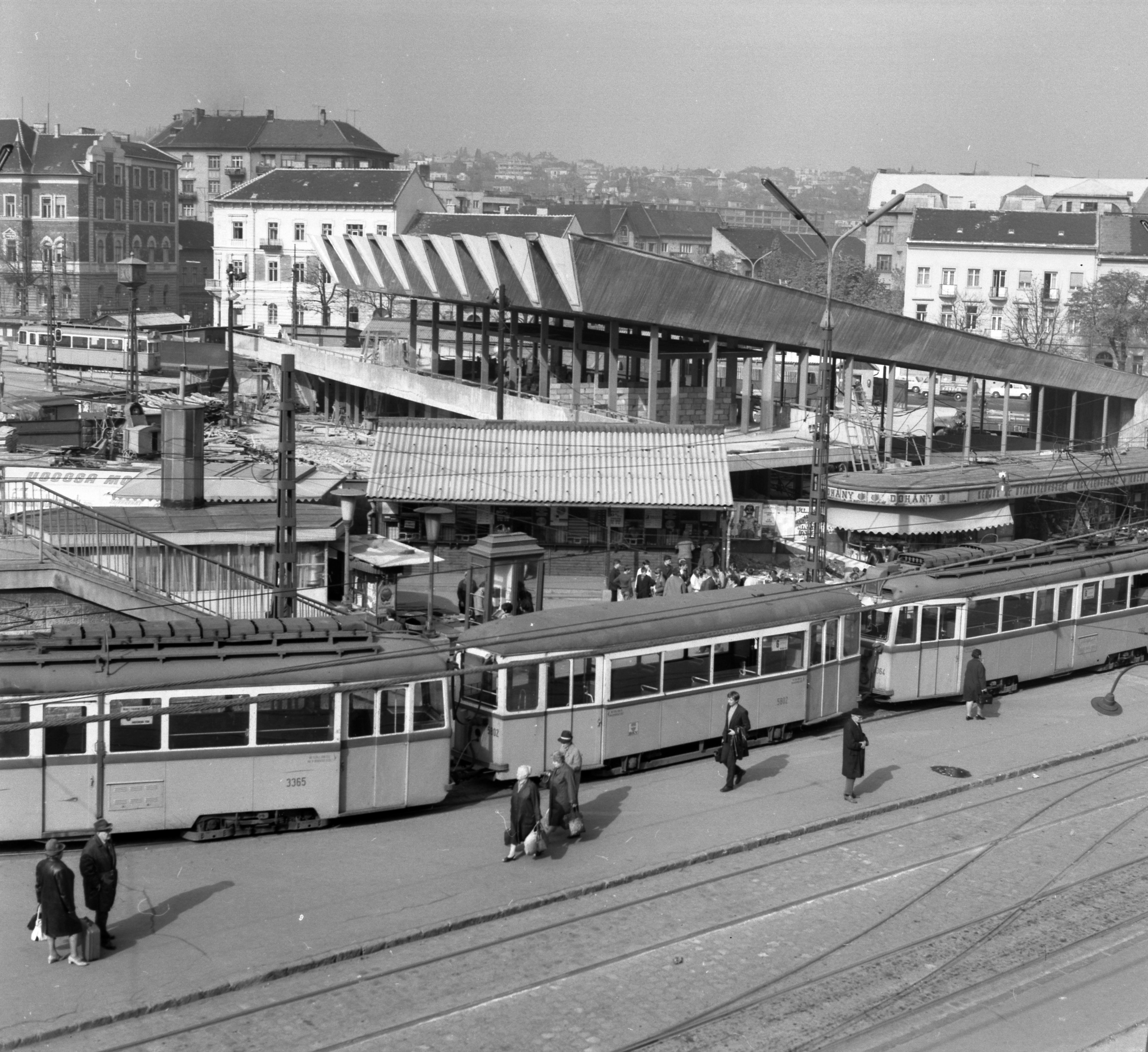 Széll Kálmán (Moszkva) tér, a metróállomás lejárócsarnokának építésekor. Location: Hungary, Budapest II. Tags: Budapest Title: Széll Kálmán (Moszkva) tér, a metróállomás lejárócsarnokának építésekor.